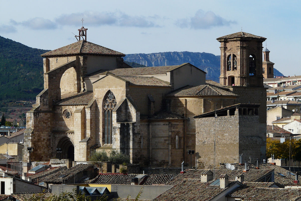 Iglesia de San Miguel, , Estella, Navarre, Spain